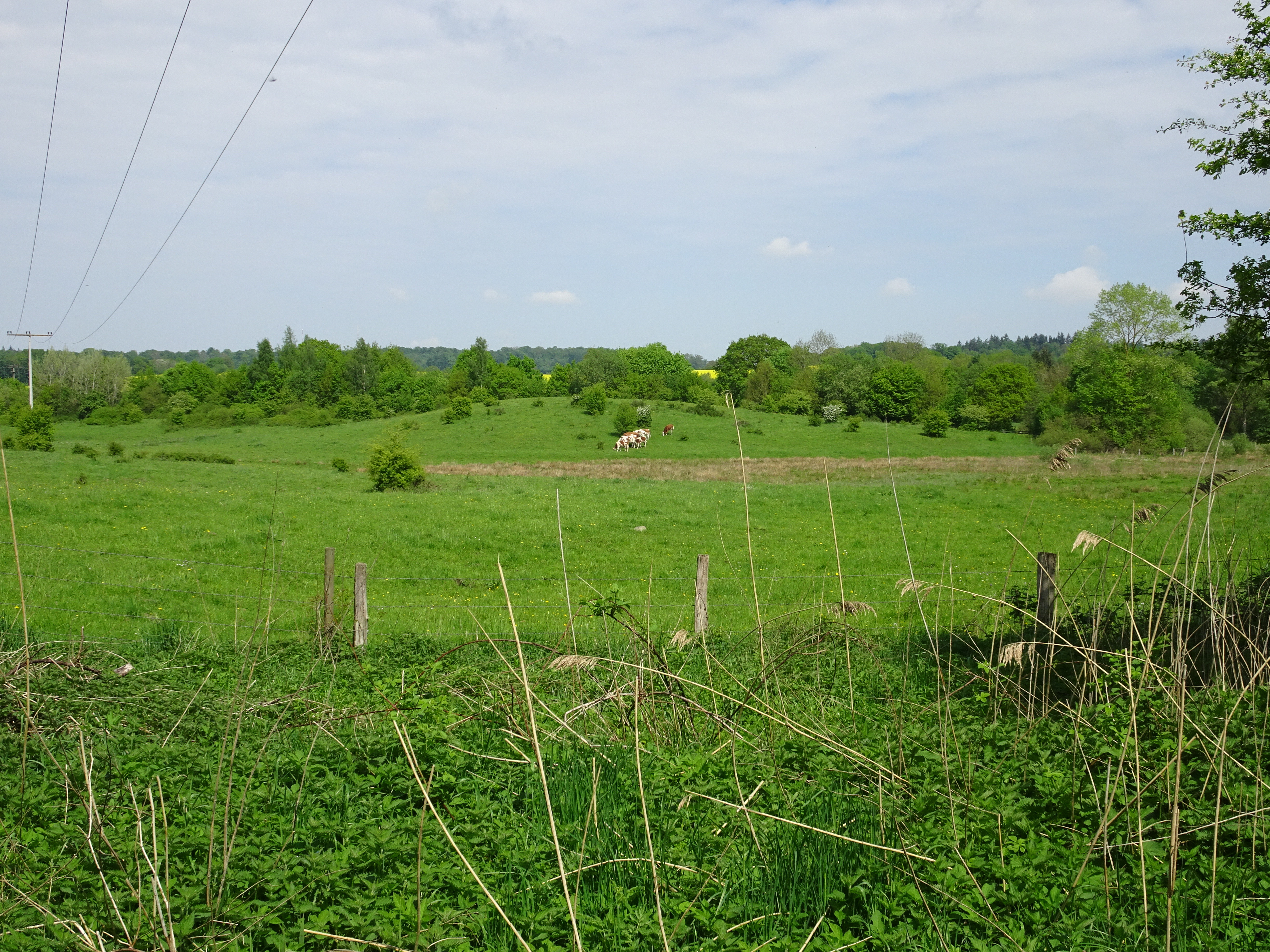 Naturschutzgebiet Kasseedorfer Teiche (Kulturlandschaft)